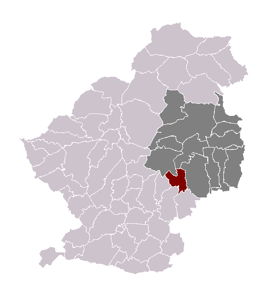 Bruille-lez-marchiennes dans son canton et son arrondissement